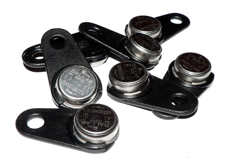 dallas keys